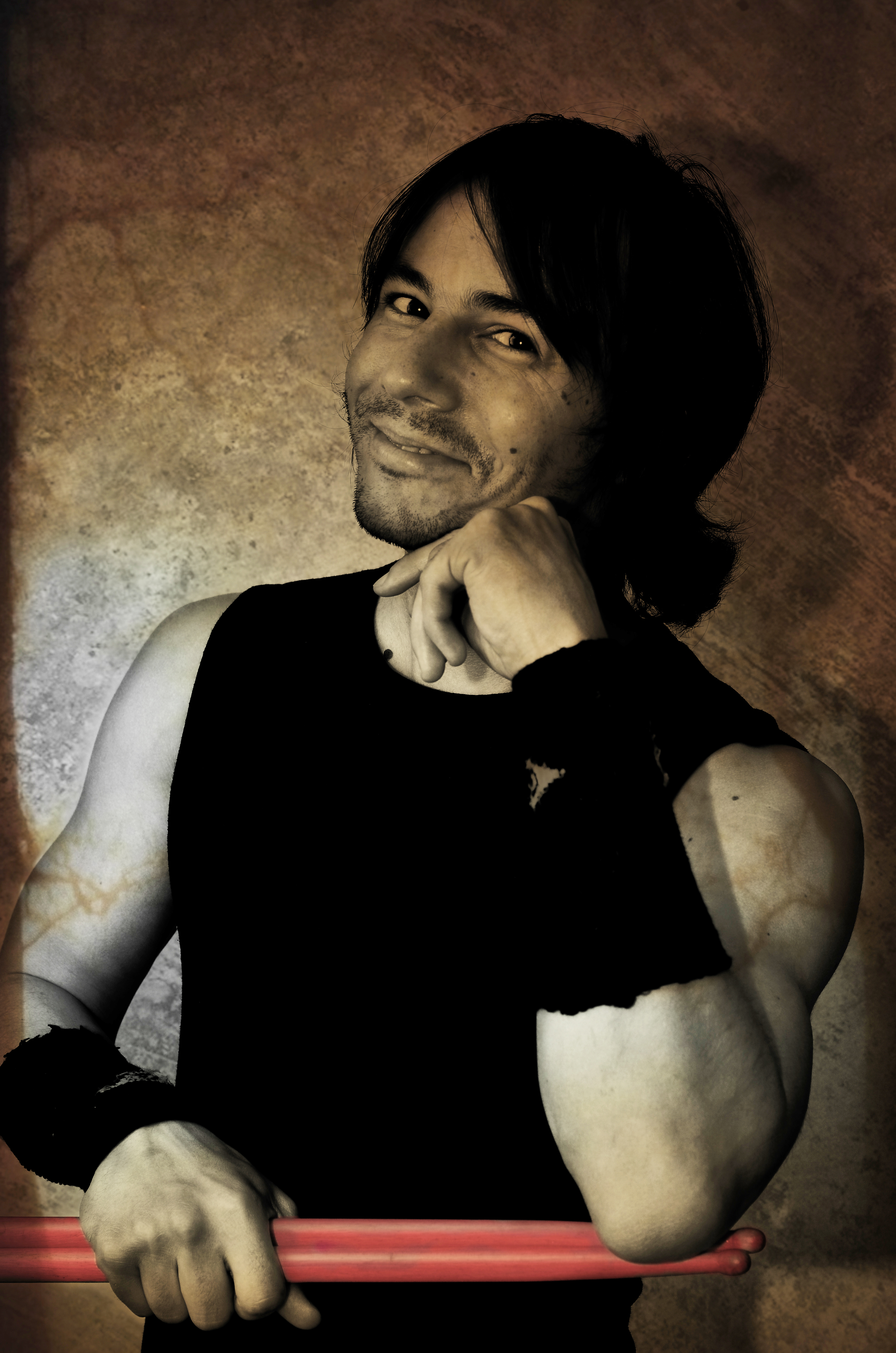 jurx